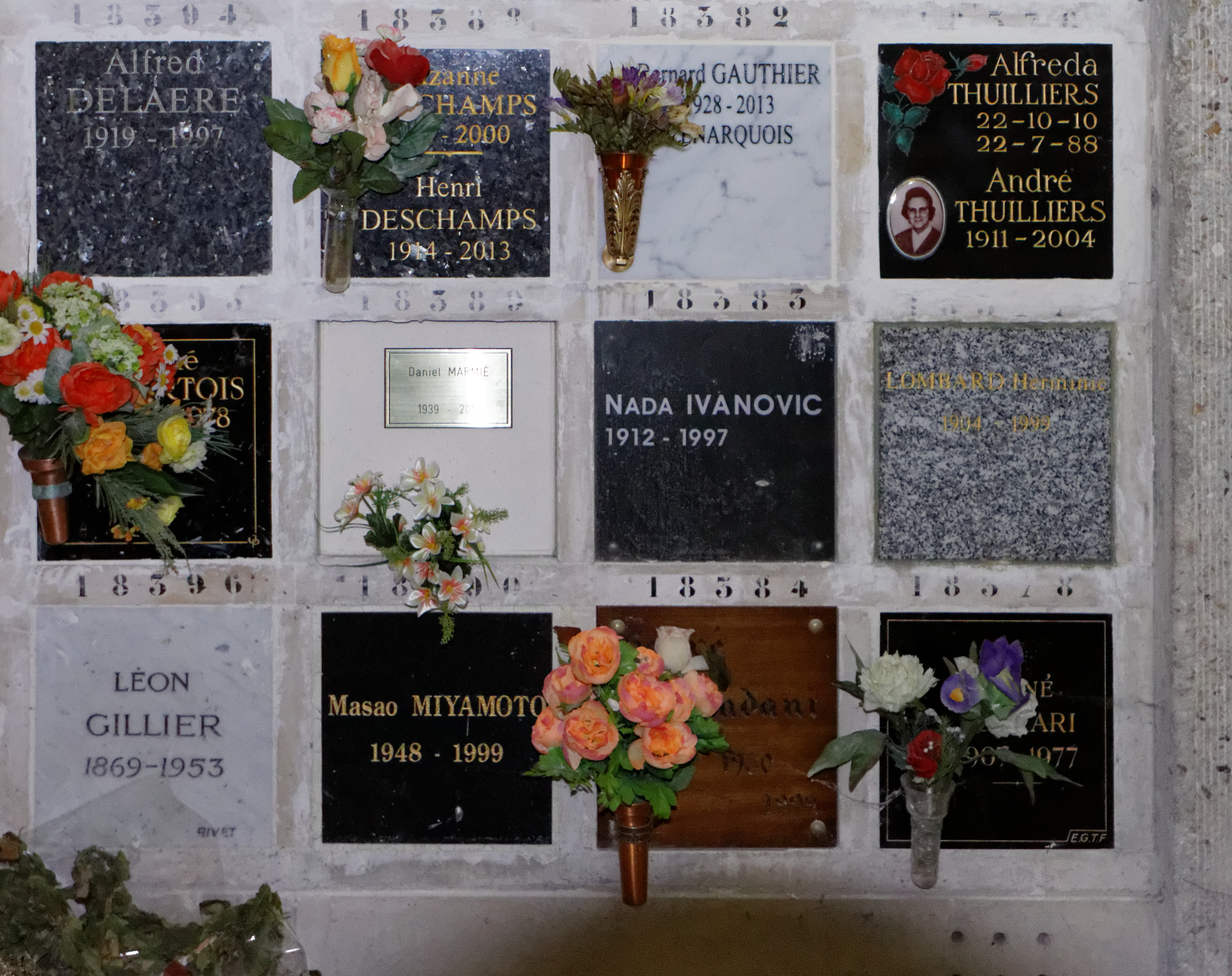 Cases du columbarium du cimetière du Père-Lachaise.